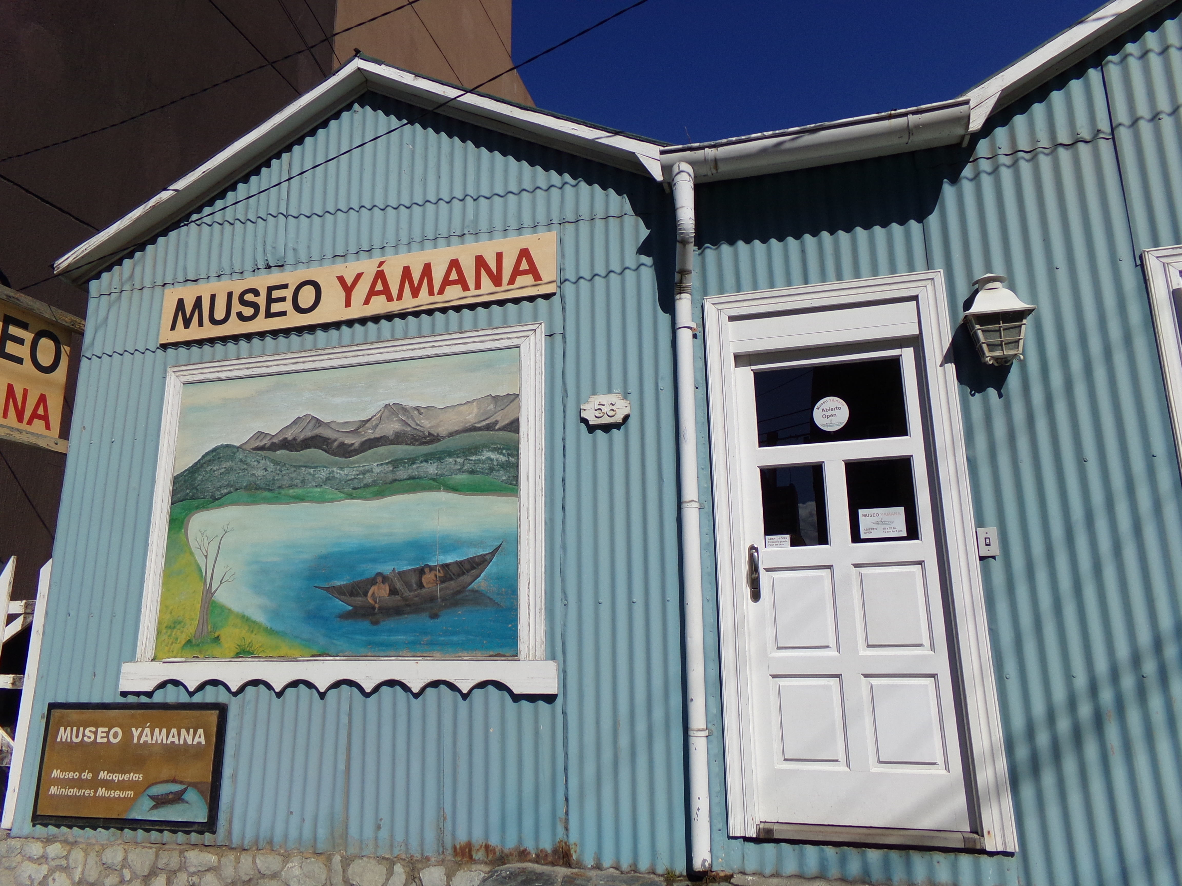 Museo Yámana, Ushuaia, Tierra del Fuego, Antártida